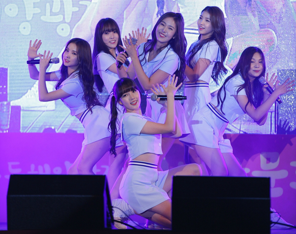 여자친구(GFRIEND) 러시아 문화 페스티벌 인천 연안부두 해양광장